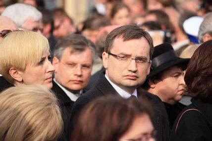 Pogrzeb pary prezydenckiej.